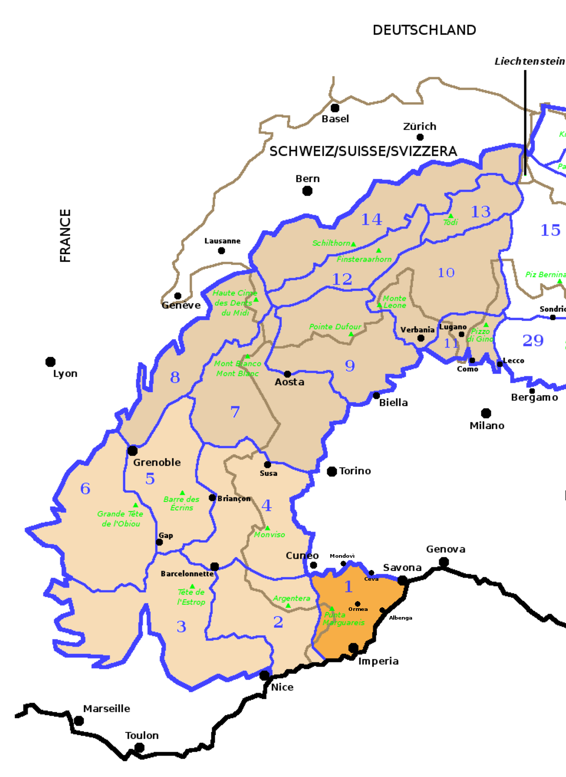 Alpi Occidentali secondo la SOIUSA con evidenziate le Alpi Liguri